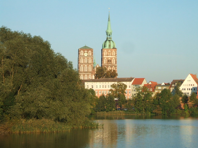 Stralsund, Germany, Nikolaikirche und Knieperteich